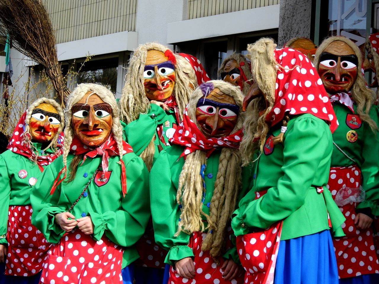 Durmerscher Hexenclub